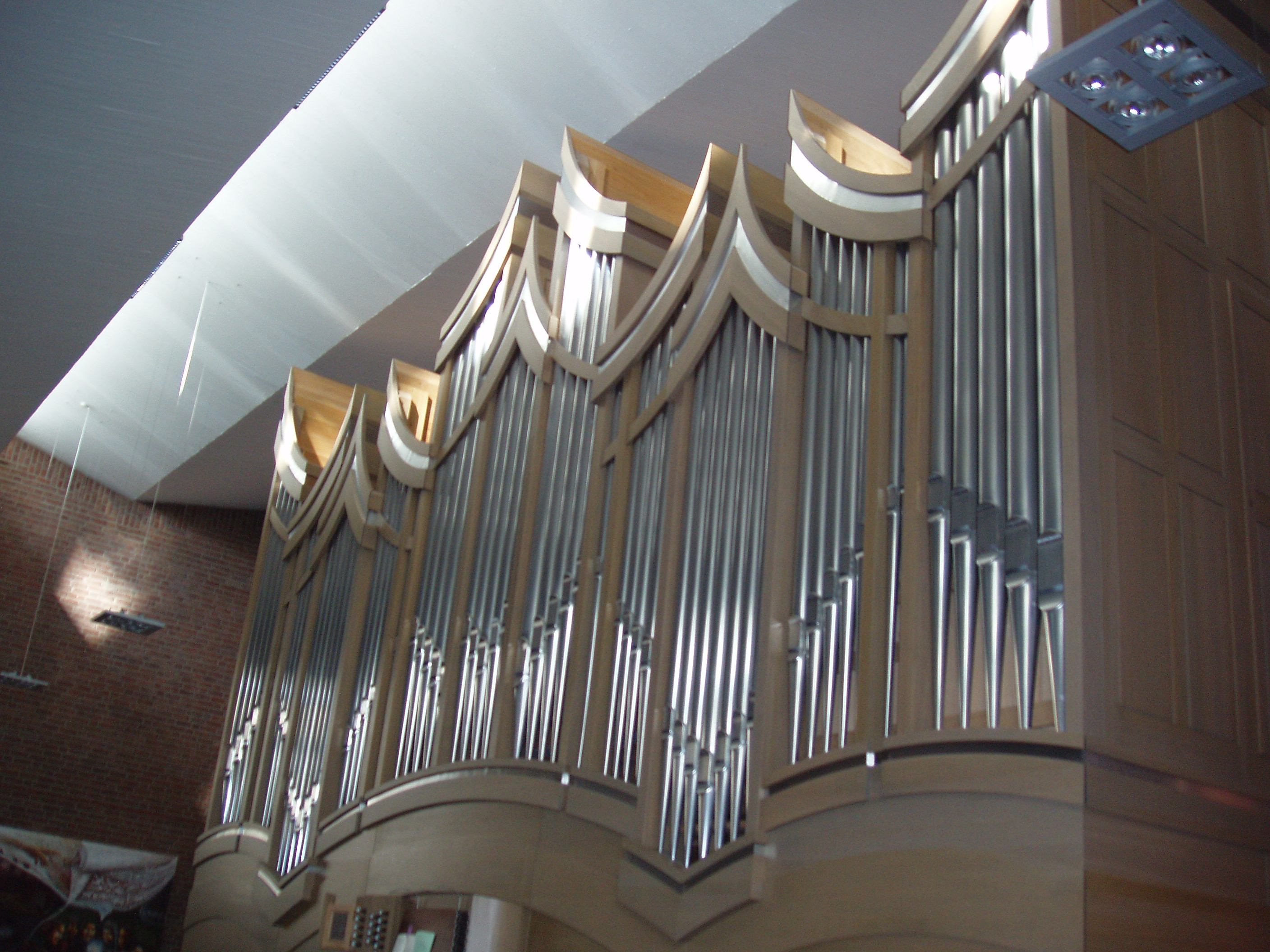 Orgel der St.-Martinus-Kirche in Langenfeld-Richrath